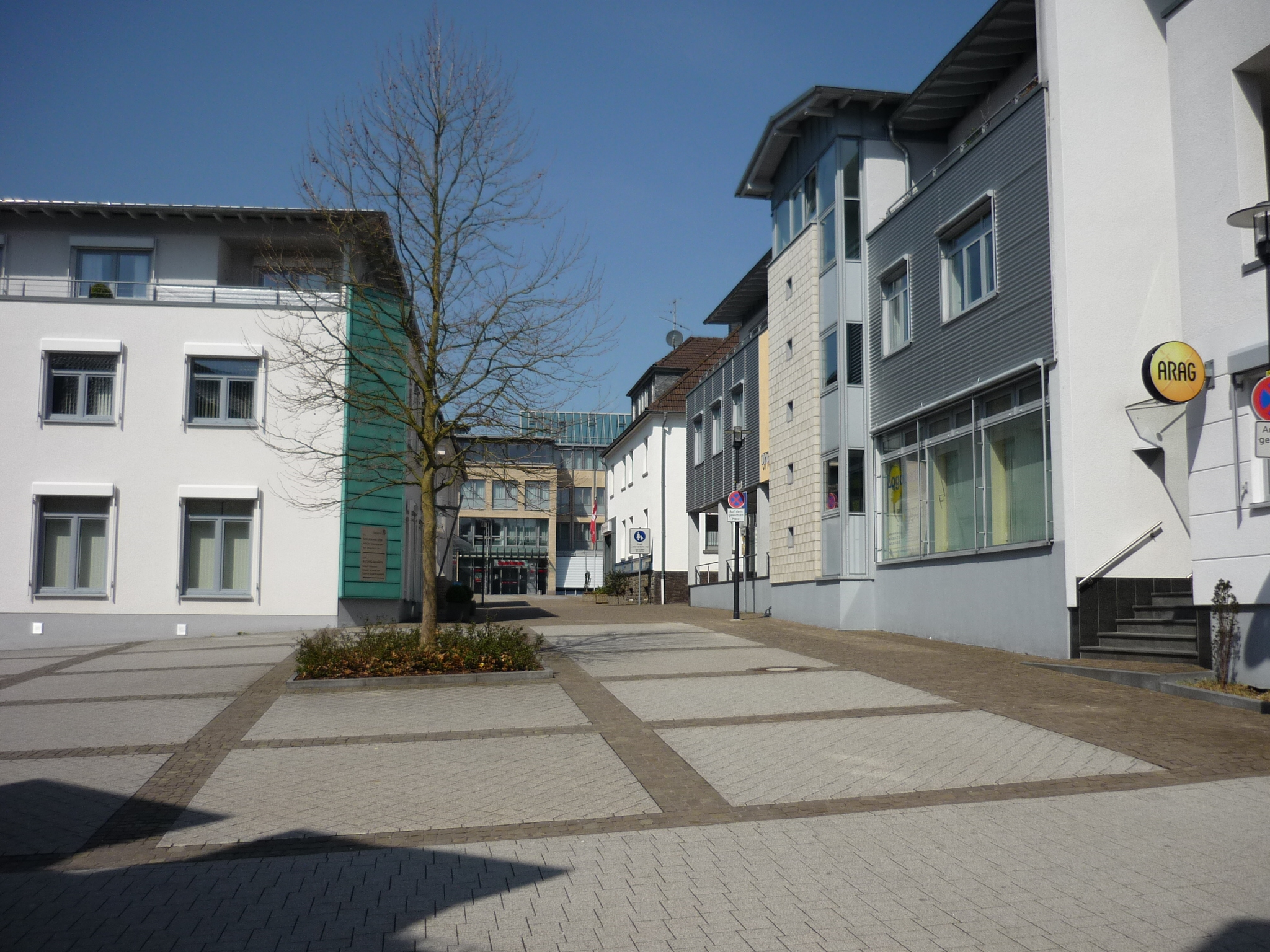 Altenkirchen: Saynstraße mit Blick auf das neue Sparkassengebäude